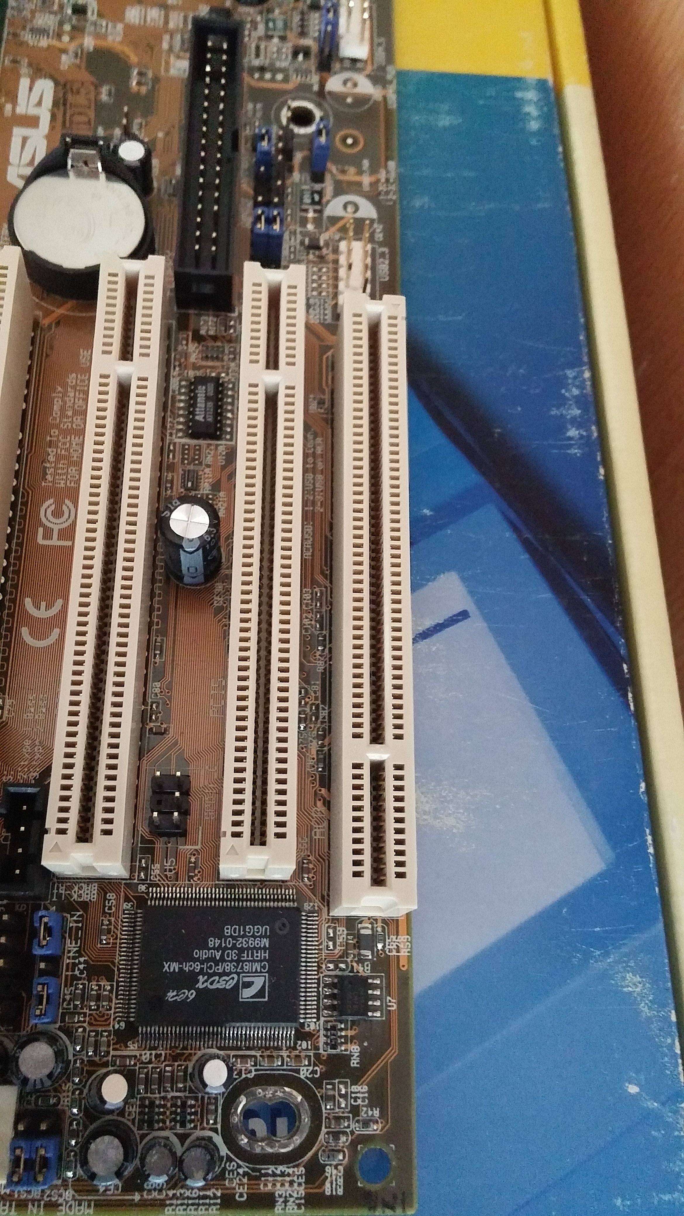 Ein ACP Ports eines ASUS A7V266